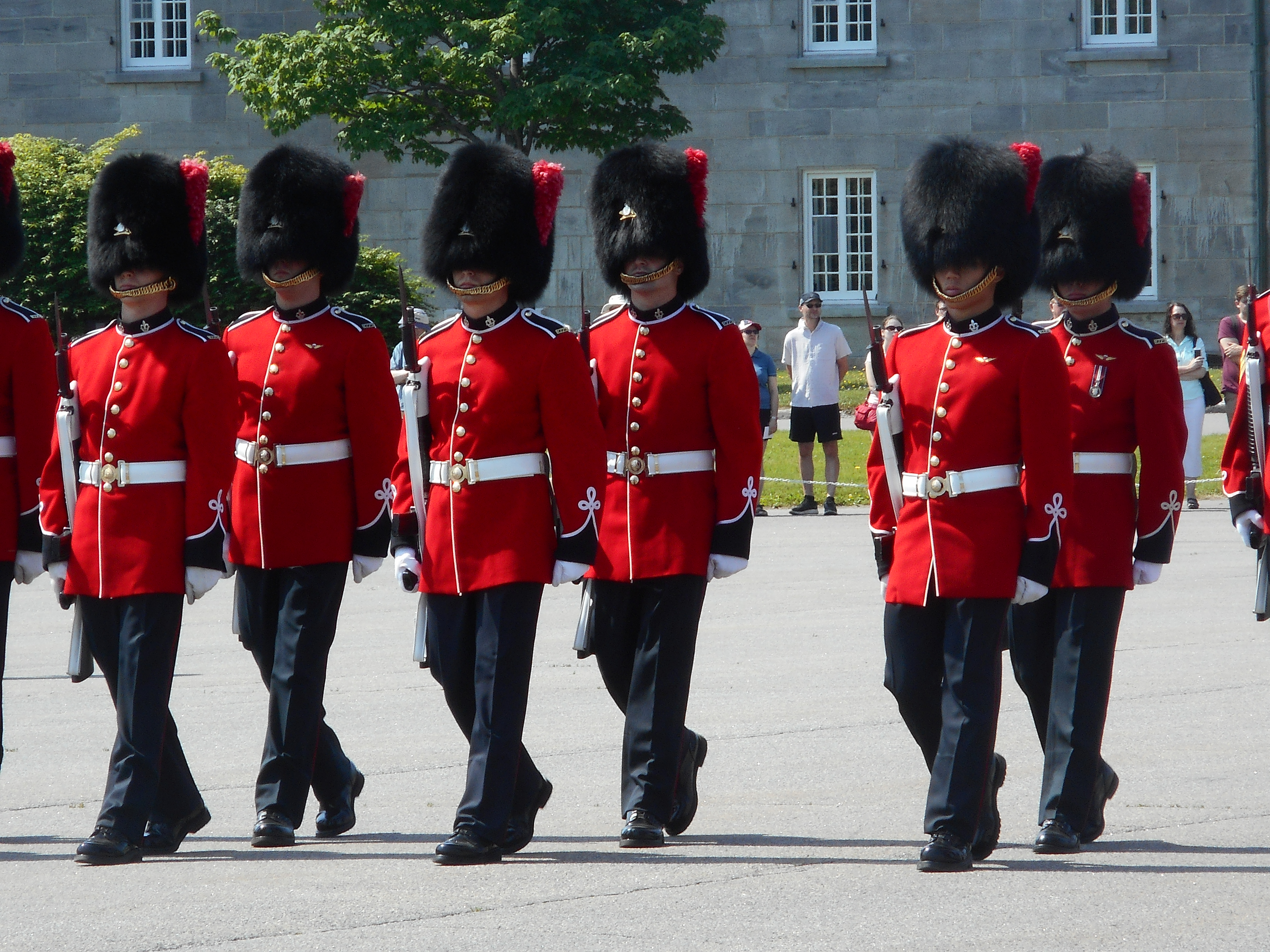 Relève de la garde, Citadelle de Québec